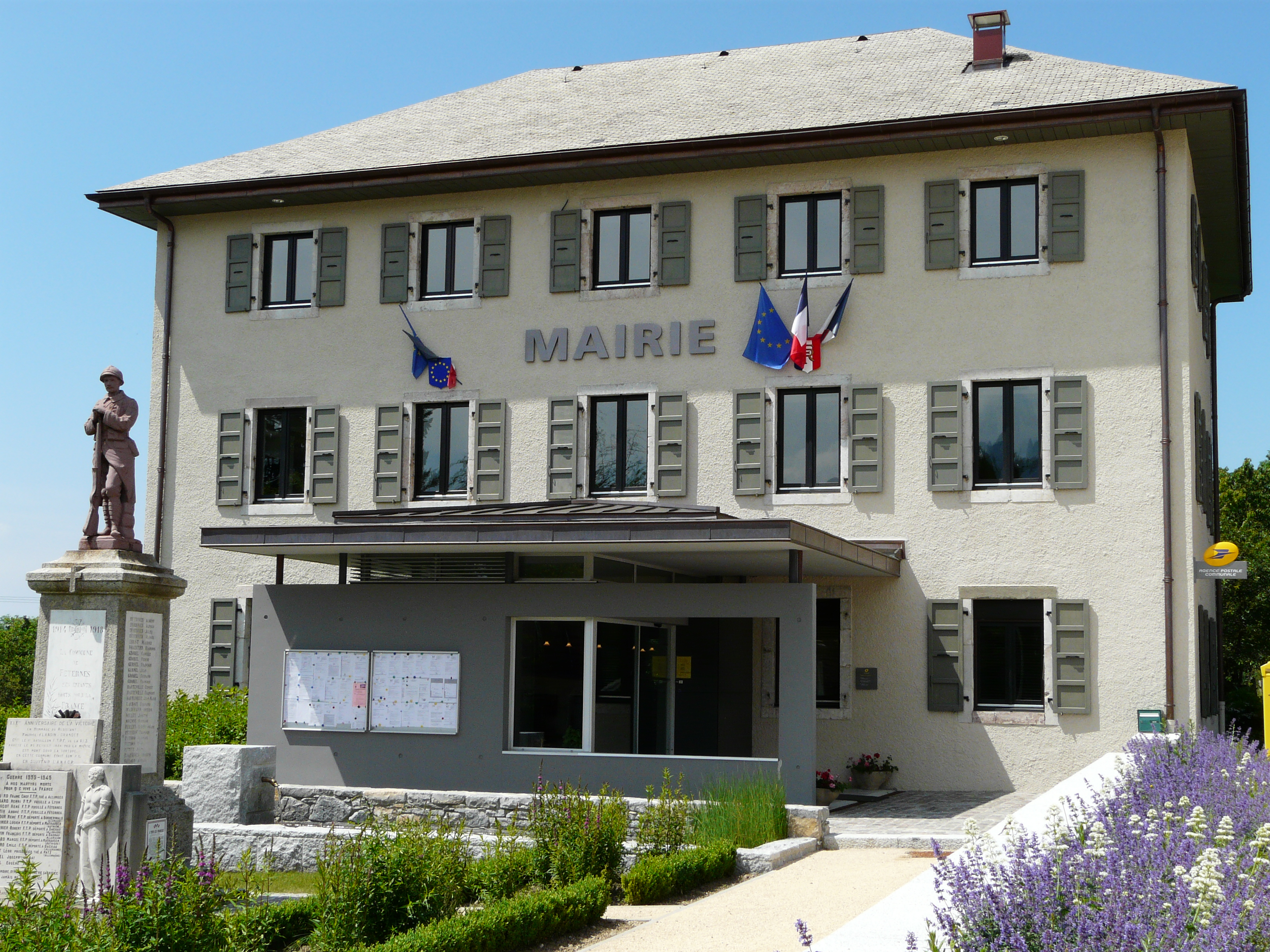 La mairie de Féternes (Haute-Savoie)